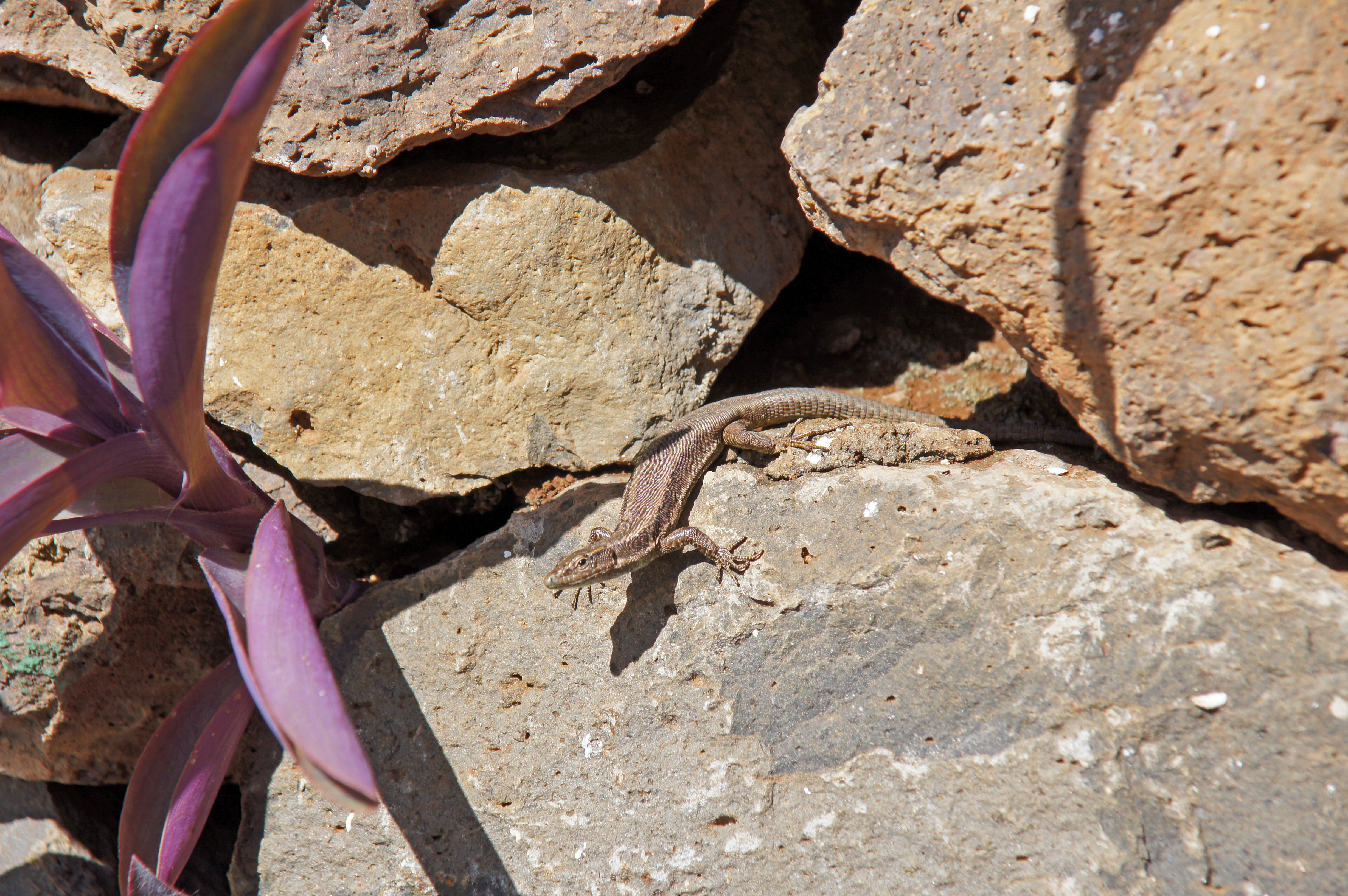 A lagartixa-da-madeira (Teira dugesii), Jardim do Mar